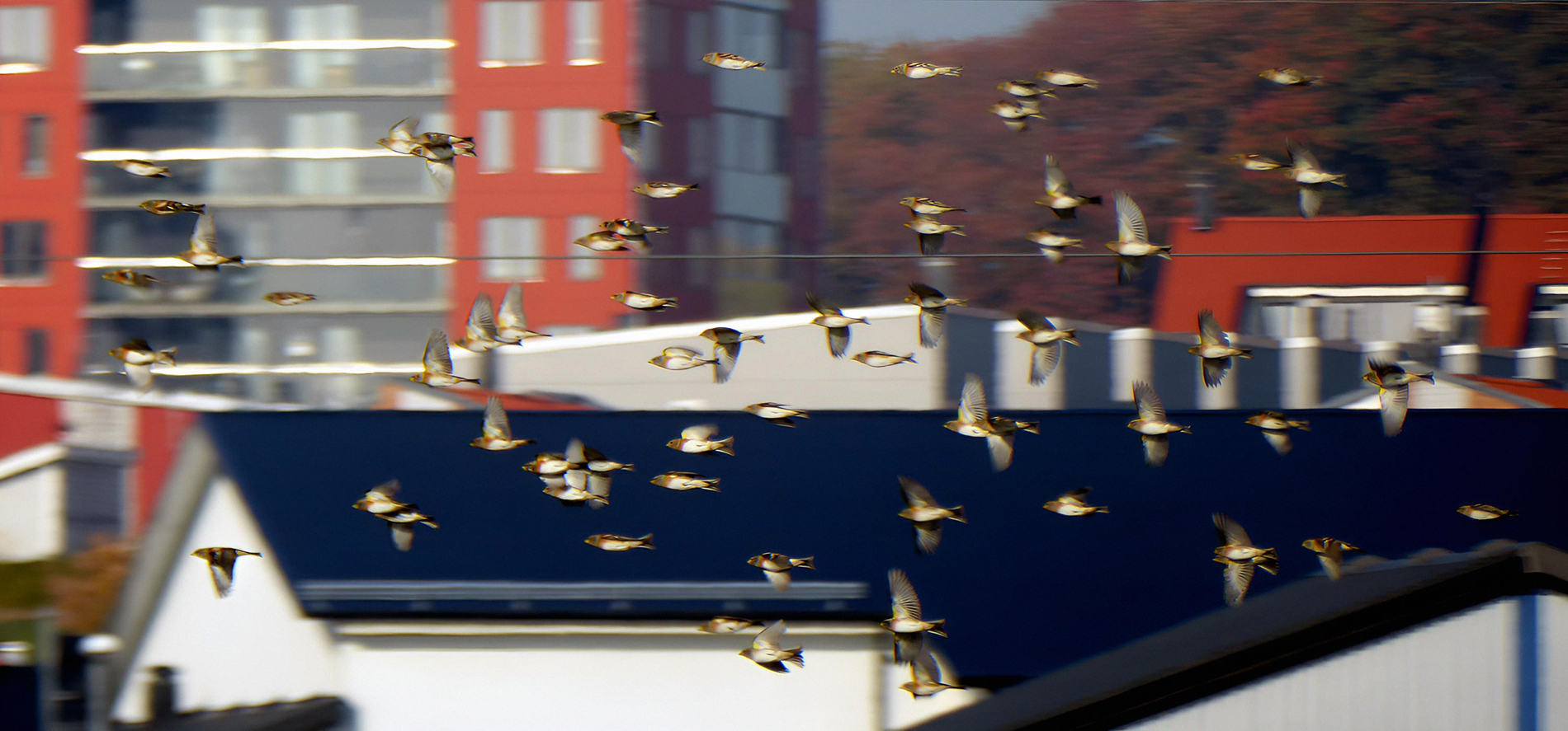 En flock sträckande Bergfinkar i Ystad 2018